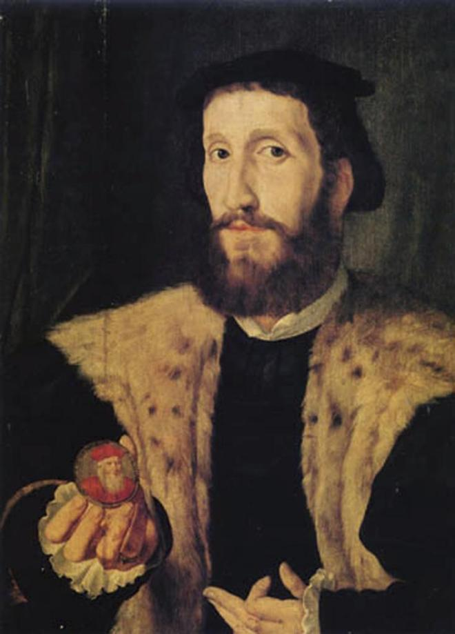 Taller de Jan Cornelisz. Vermeyen: Alfonso de Valdés, c. 1531, óleo sobre tabla, 42 x 33,8 cm, Londres, The National Gallery